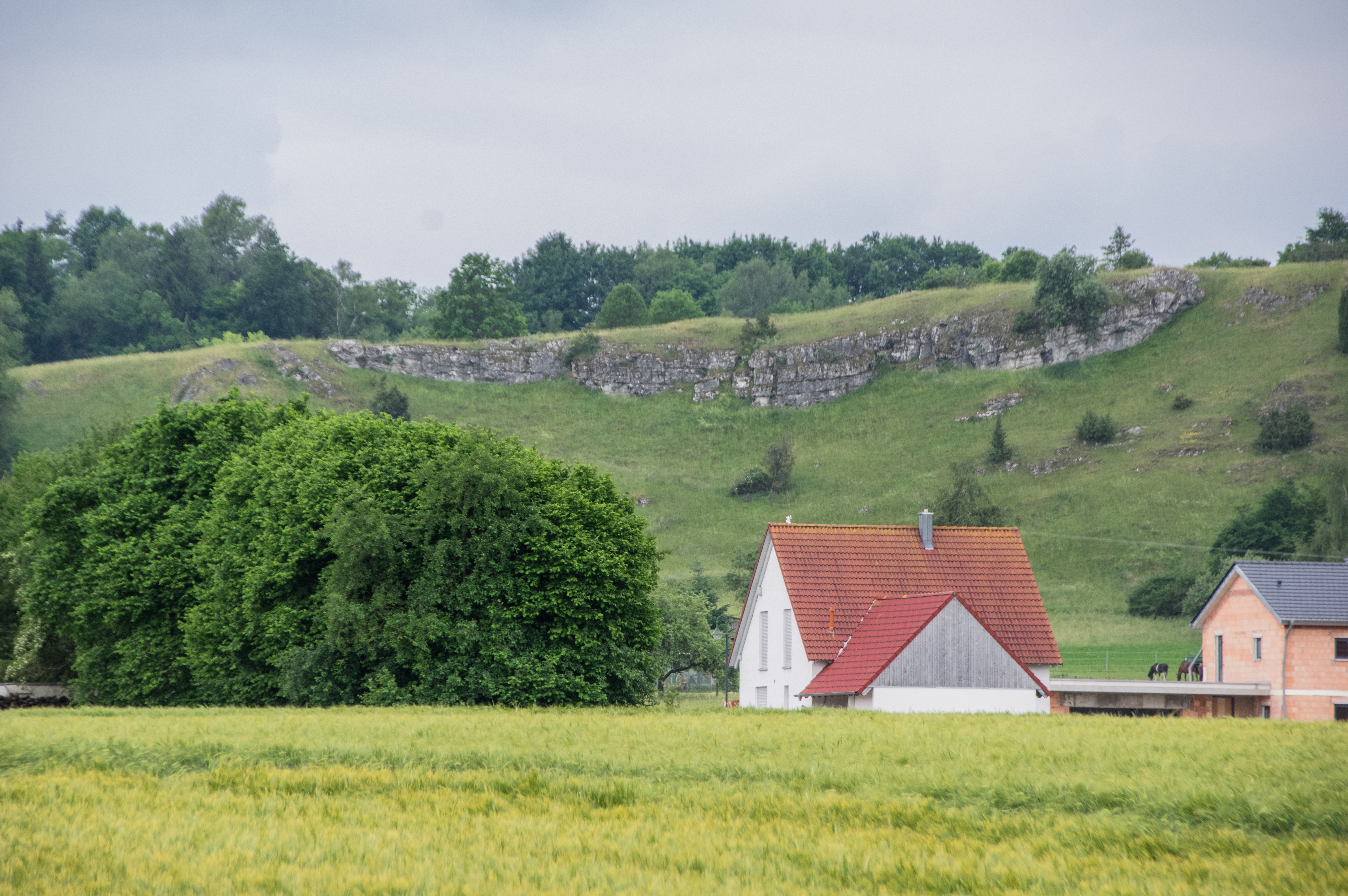 Kühsteinfelsmassiv von Norden, Blick von der Kreuzlesbrücke an der Kreisstraße DON 9.Naturdenkmal ND-06614